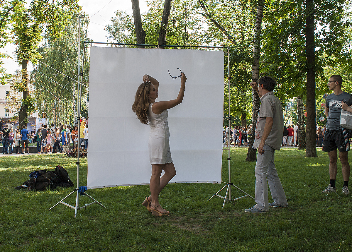 Проект «Силует» у Вінниці